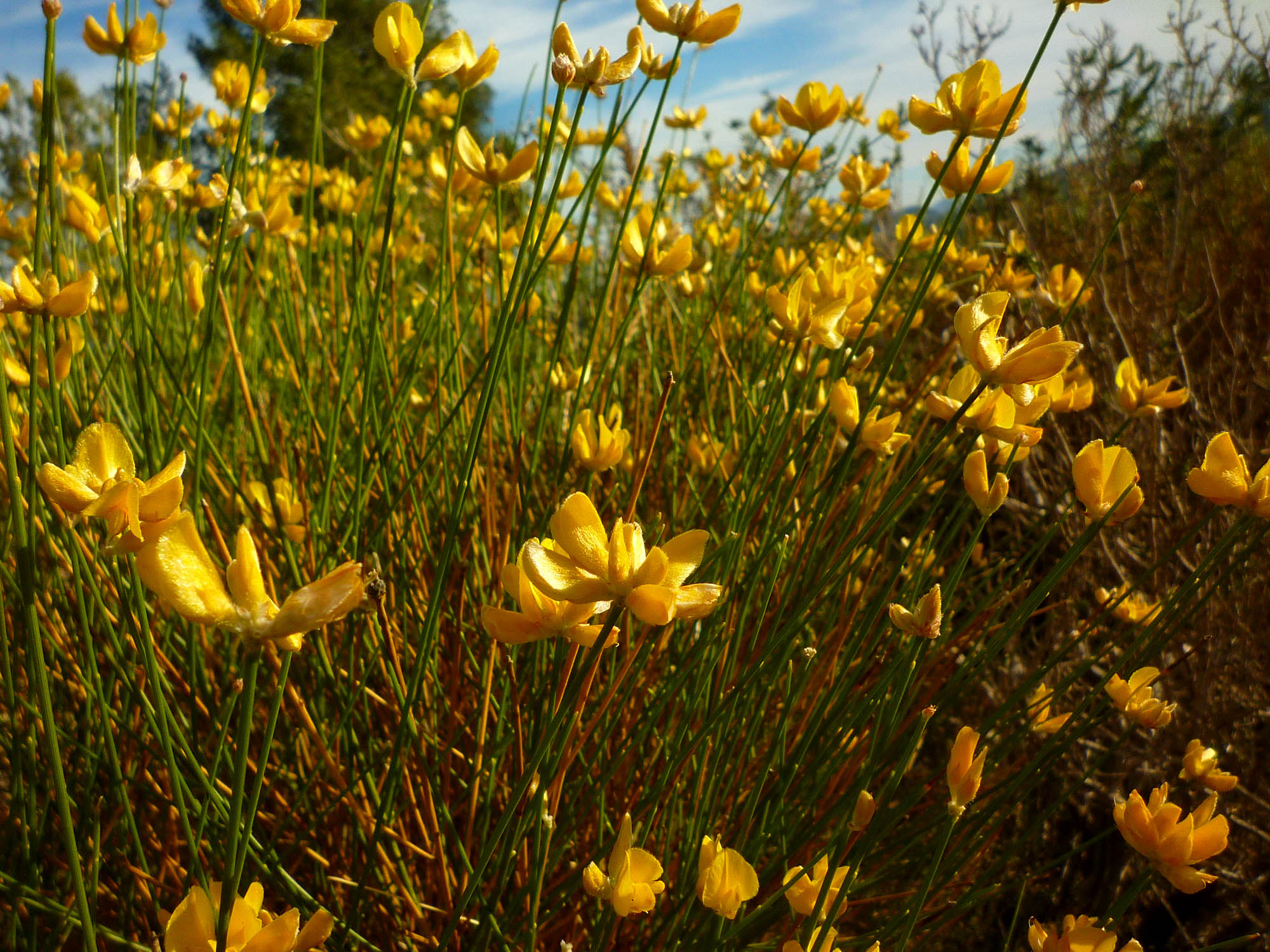 Genista umbellata en la Sierra de la Muela, Cartagena, España.